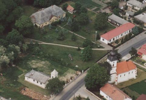 Preĝejo de Anarcs.